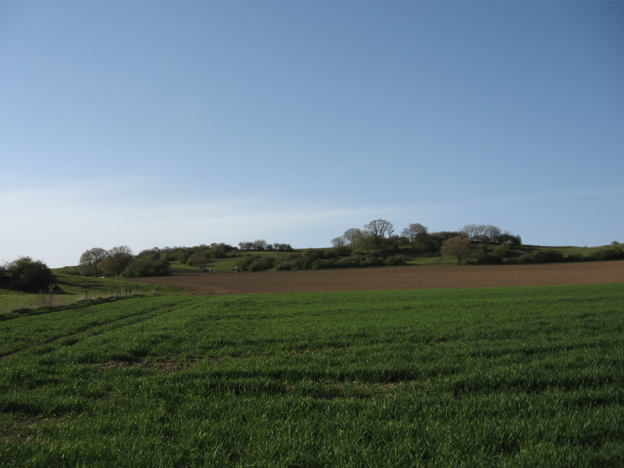 Der obere Bildbereich mit gebüschreichem Grünland gehört zum NSG Lörmecketal östlich der Höhle Hohler Stein bei Rüthen-Kallenhardt. Ansicht zwischen Hohlem Stein und Warte.